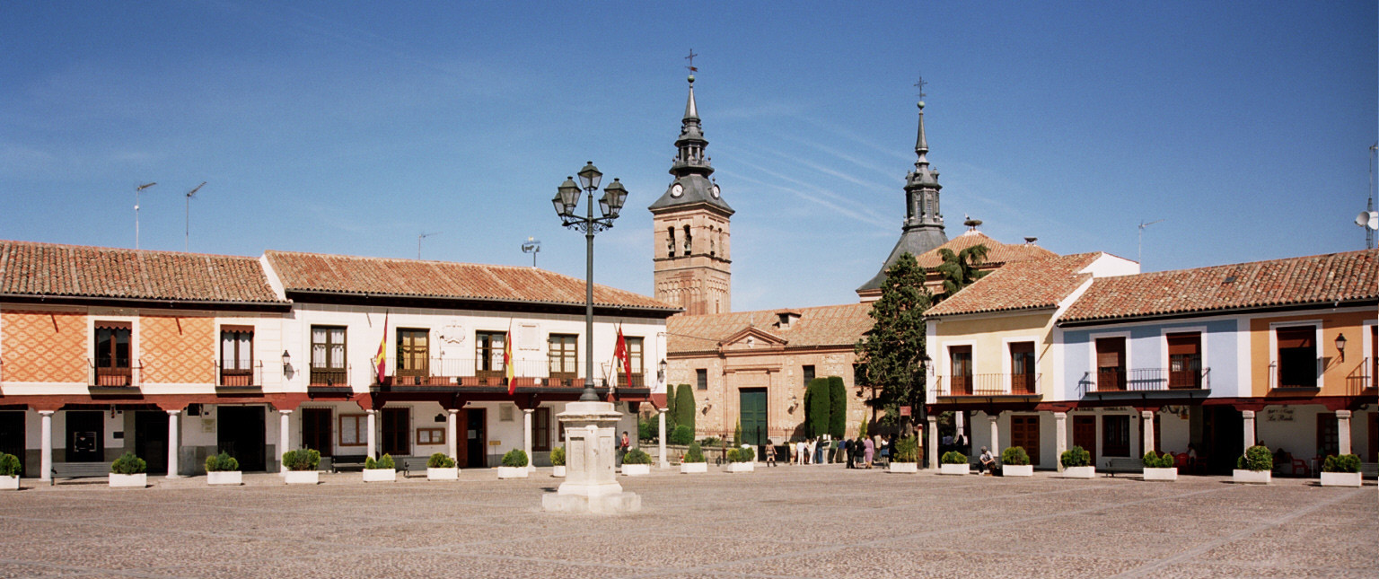 Plaza de Segovia con Ayuntamiento e iglesia en Navalcarnero.